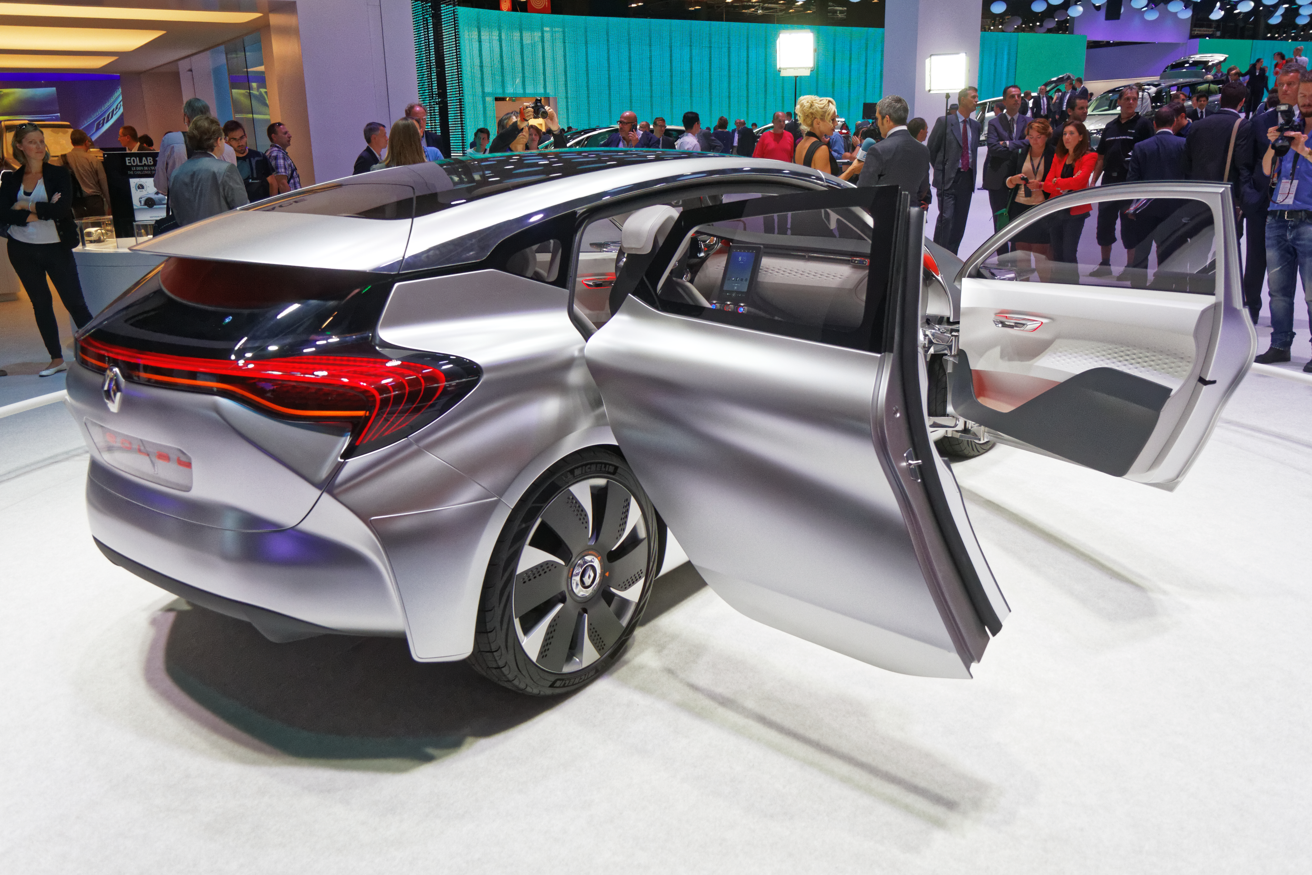 Une Renault Eolab présentée lors du mondial de l'automobile de Paris 2014.